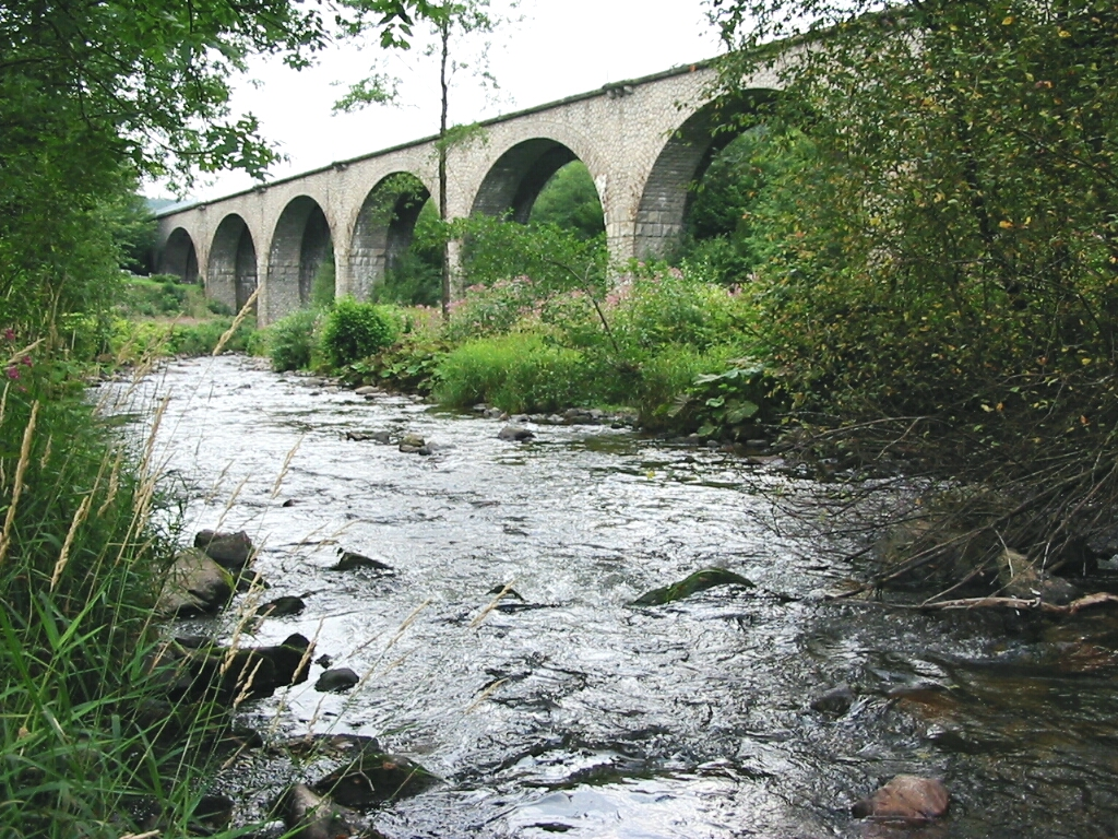 La rivière Bruche (département du Bas-Rhin, France) Pont du chemin de fer à Fouday. Photographie personnelle prise le 24 août 2005. Copyright © Christian Amet